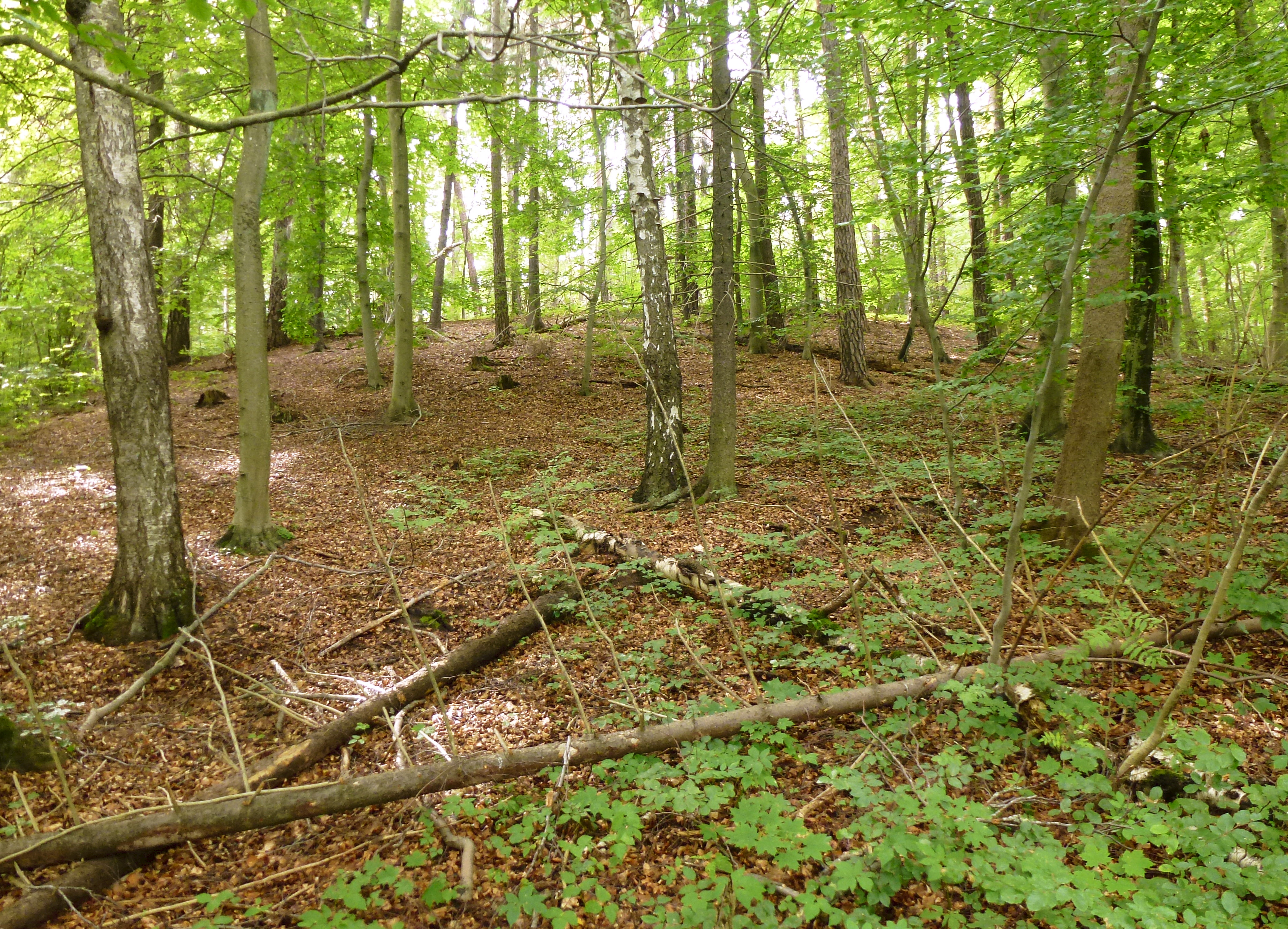 Bokskogen i Ulriksdals naturreservat